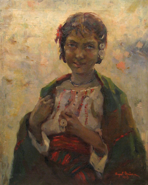 Aurel Băeşu (1896 -1928) - Ţiganca, semnat dreapta jos cu roşu, ulei pe pânză, datat 1919, 67.5x54.5cm.